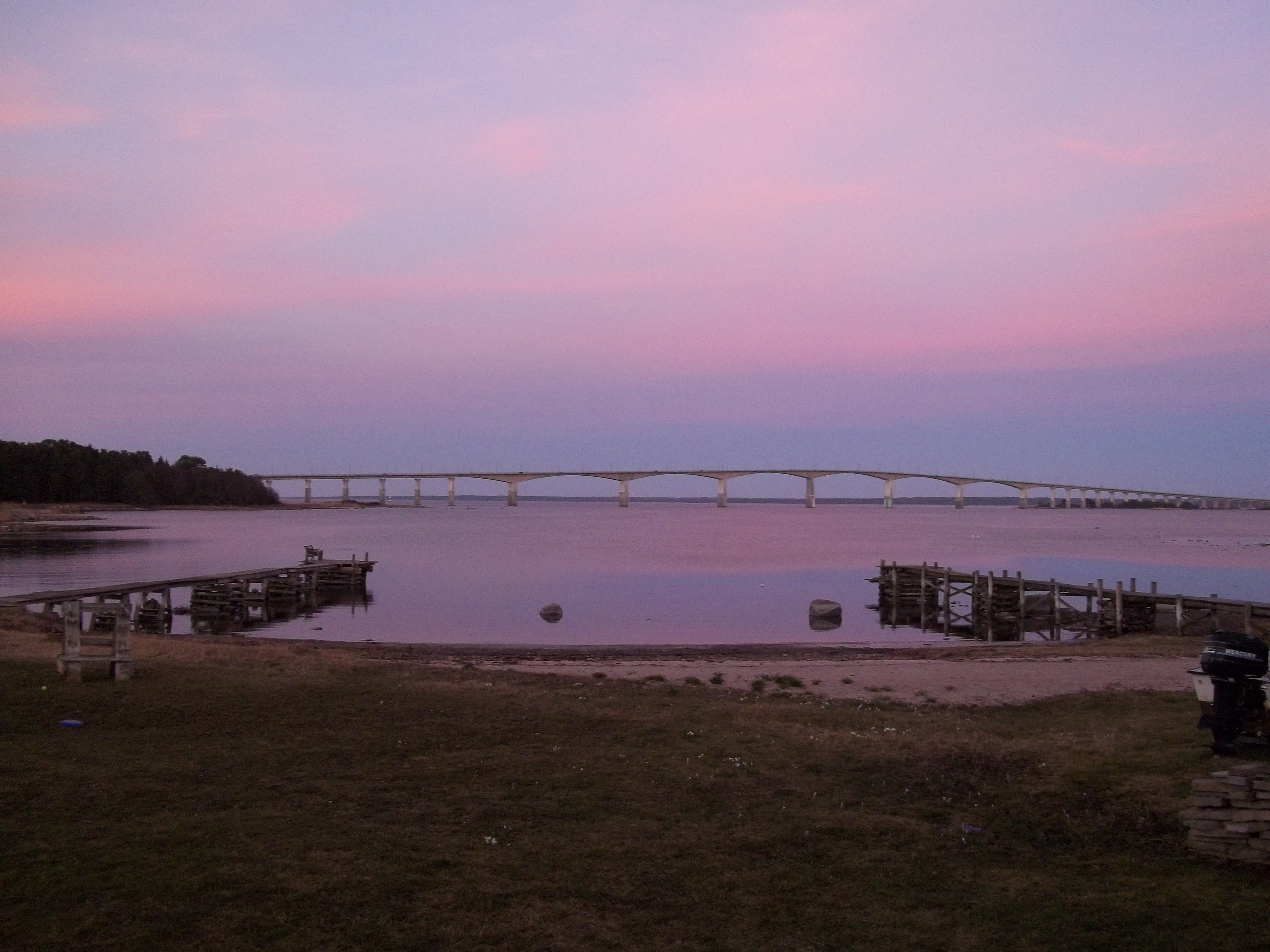 Vista al tramonte del ponto dell'Öland, scattata da Kalmar